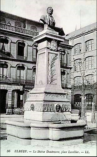 Buste en bronze de Lucien Dautresme place Lecallier à Elbeuf. Ce buste n'existe plus.